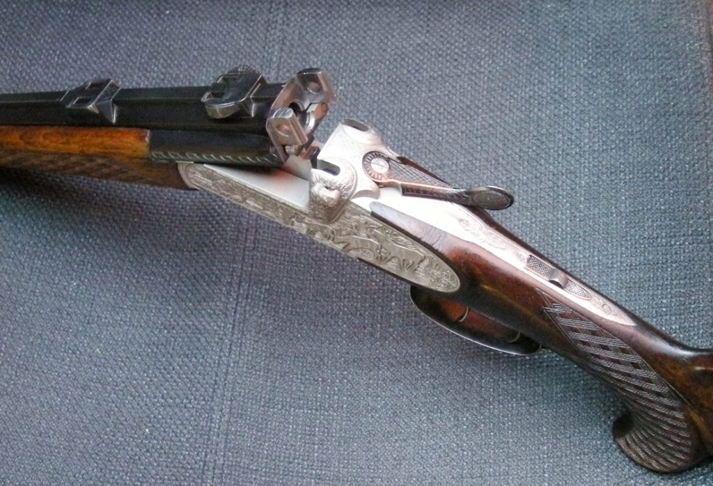 Kipplaufbüchse